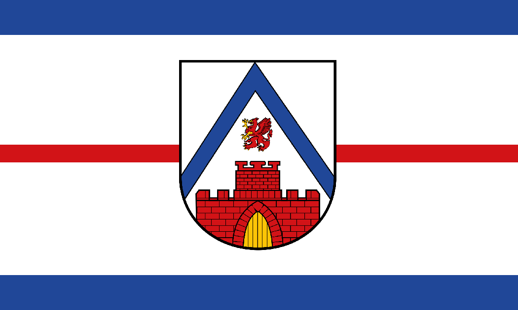 Flagge der Stadt Eggesin